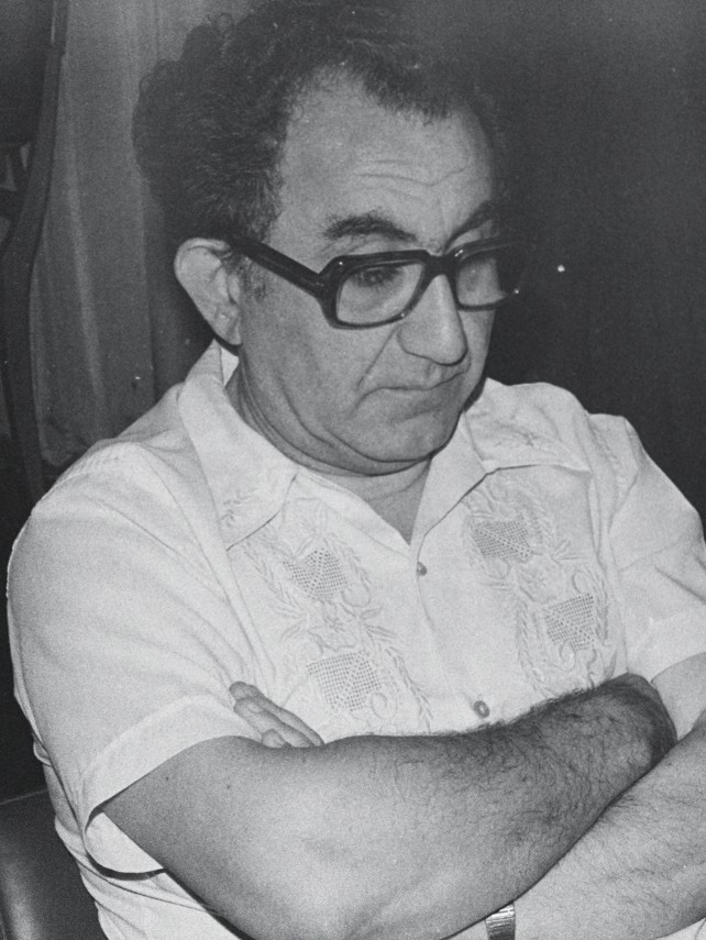 Tigran Petrosian, während des Interzonenturnieres 1979 in Rio de Janeiro.